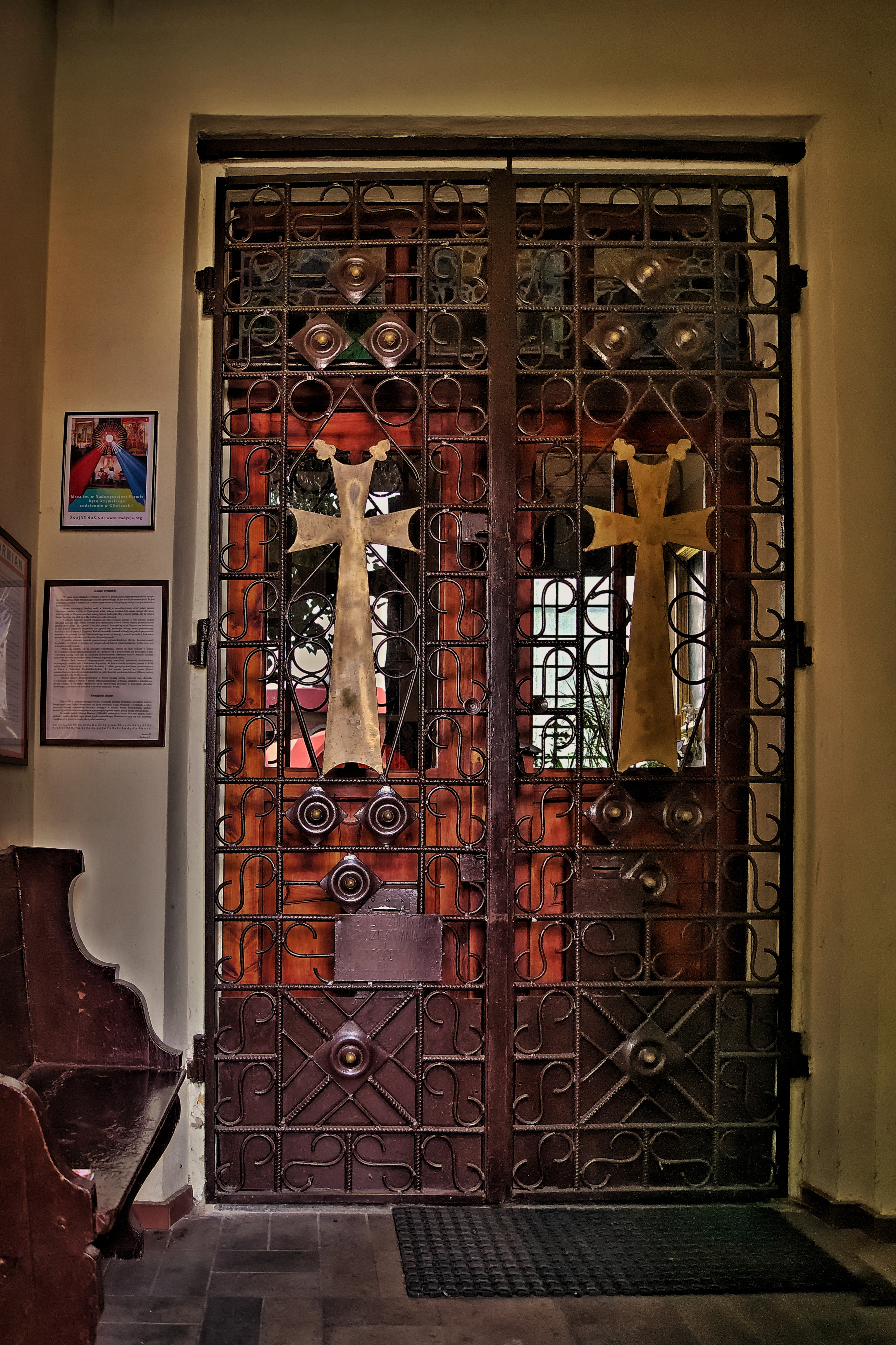 Gliwice, Kościół Trójcy Świętej w Gliwicach